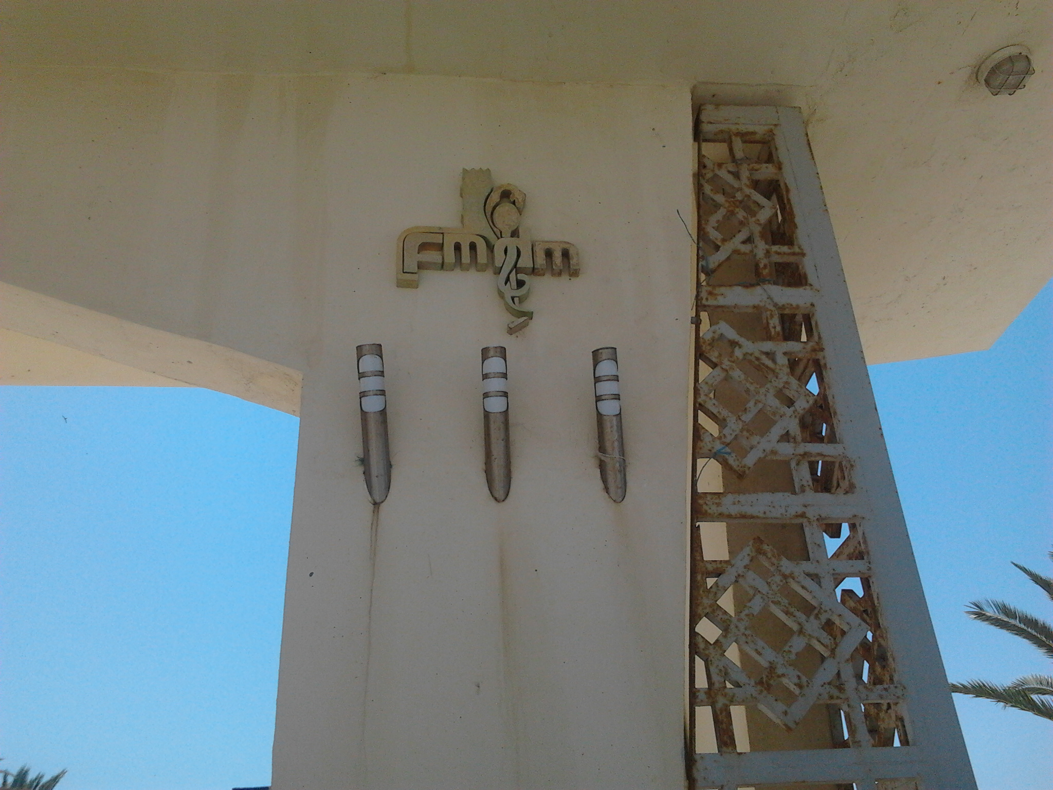 Sigle de la faculté de médecine dentaire de Monastir